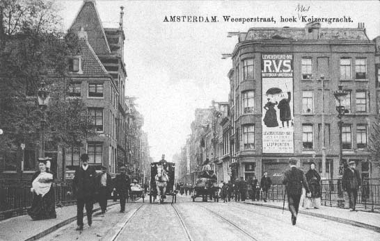 Prentbriefkaart van de Weesperstraat in Amsterdam bij de hoek met de Nieuwe Keizersgracht, circa 1910